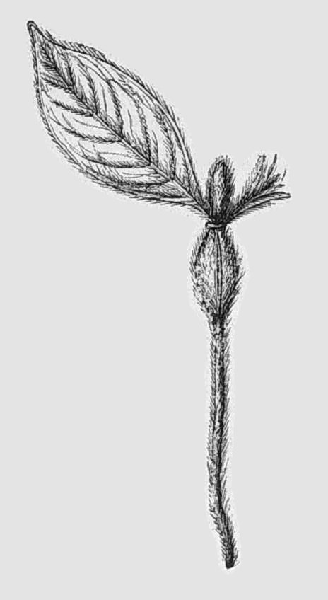 Duroia hirsuta